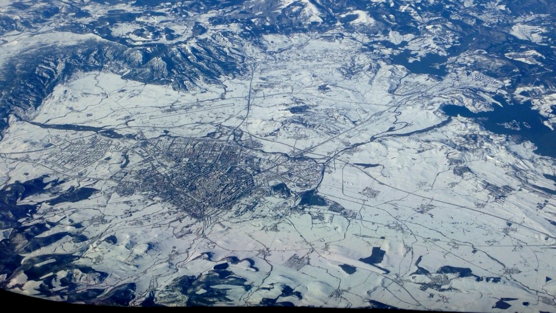 Elurra Gasteiz gainean.